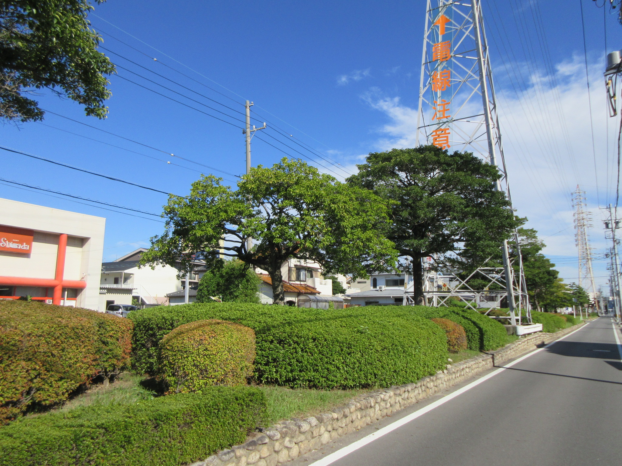 六名東緑道（岡崎市六名東町）